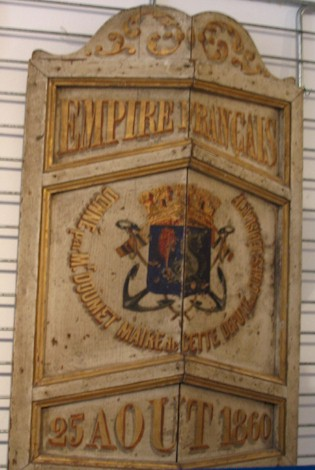 photo perso d'un bouclier ancien de joutes nautiques à Sète (Hérault).